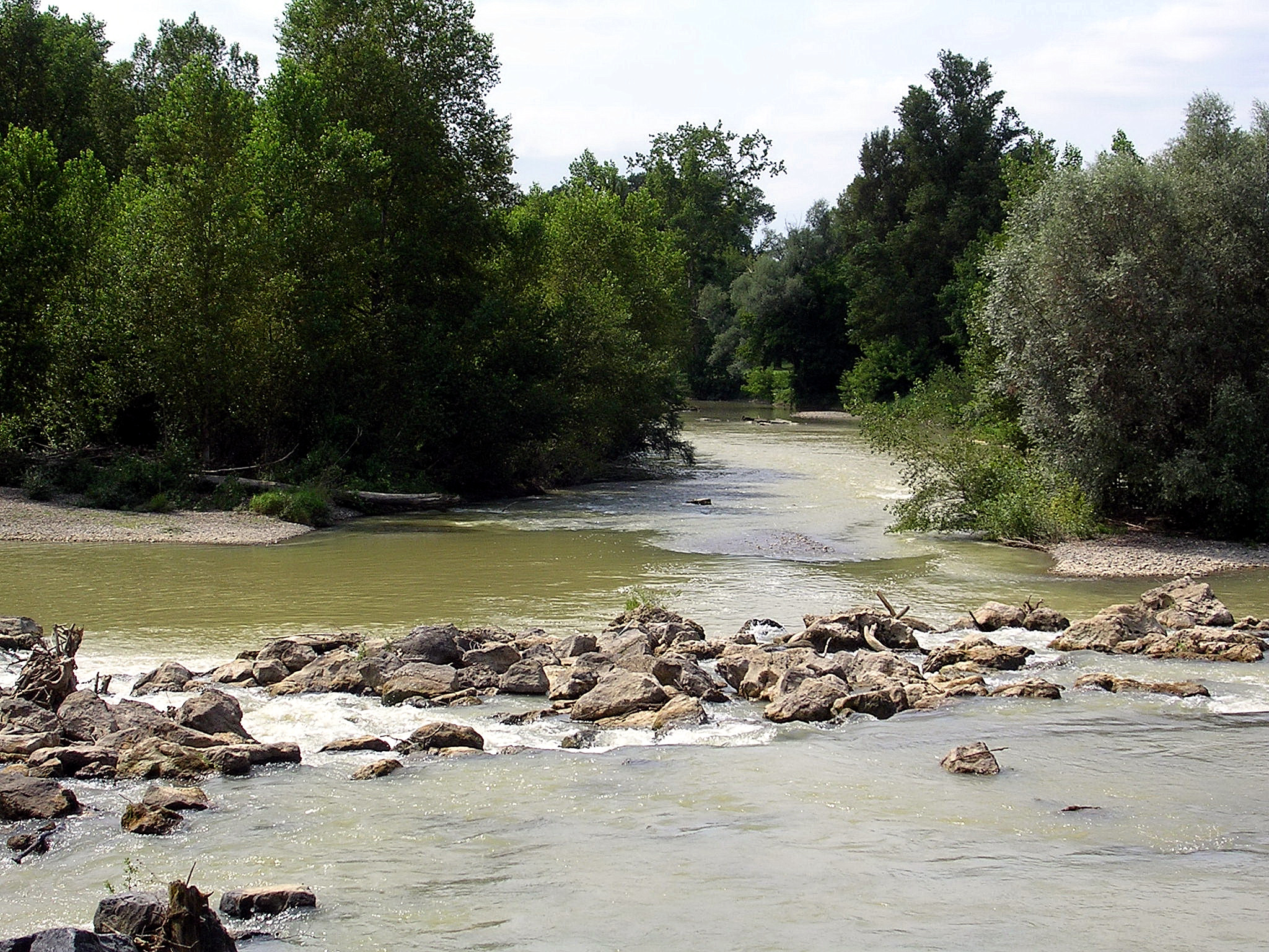 L'Adour à Saint-Sever (Landes, France)